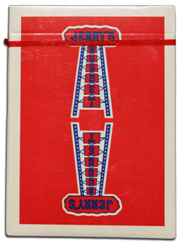 Le dos du paquet de jerry's nugget.